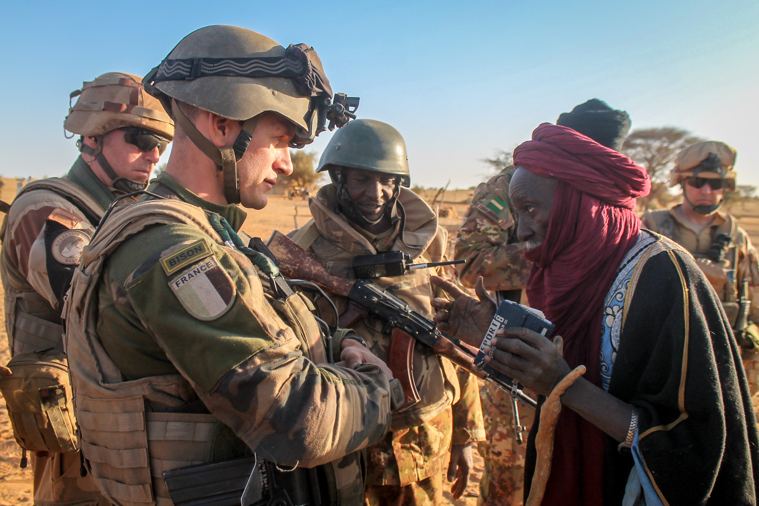 contact avec la population dans le Sud du Mali